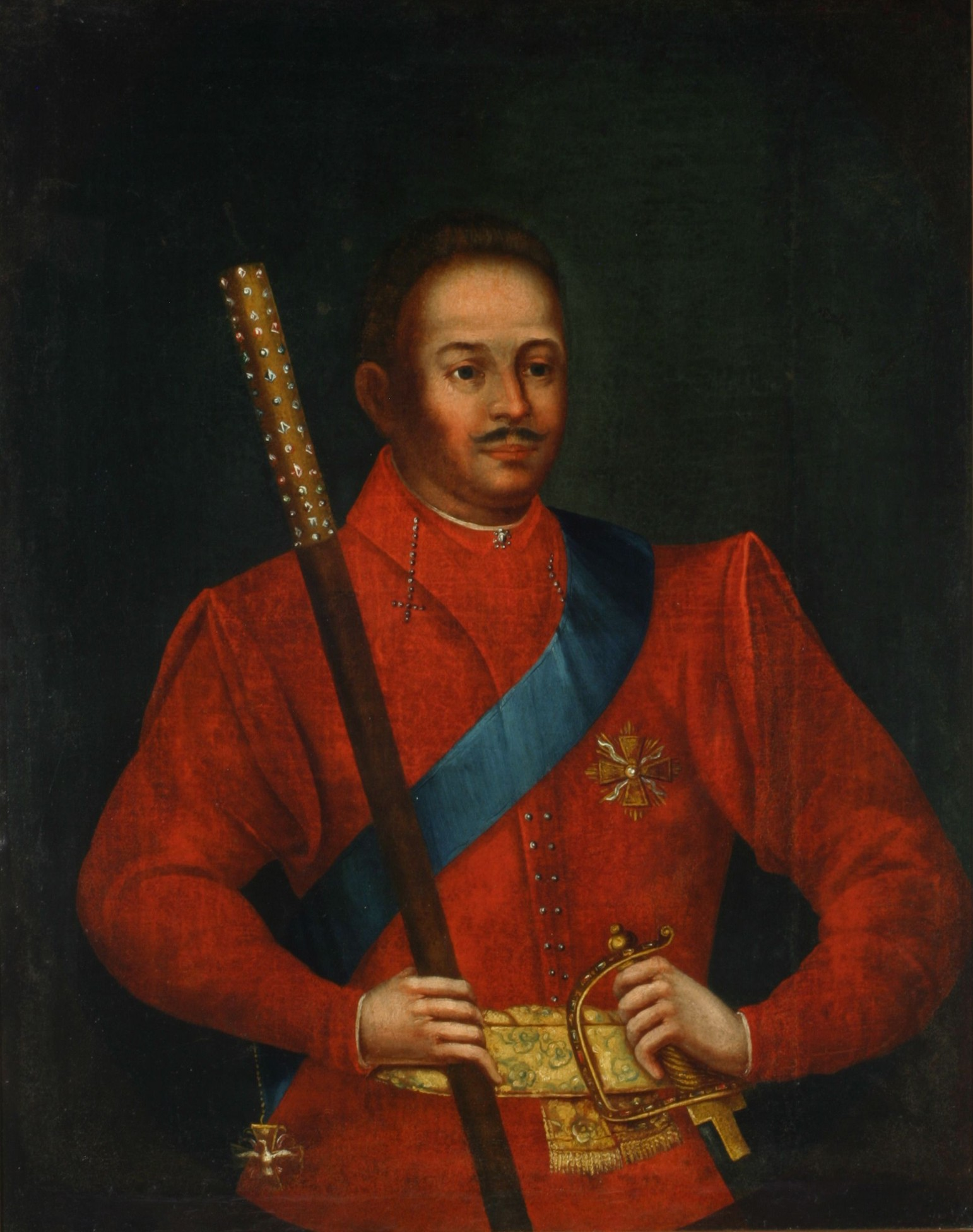 Беларуская (тарашкевіца): Партрэт Ігнація Аніцэты Завішы (Ihnaci Aniceta Zaviša) гербу «Лебедзь» (каля 1690 — 1738), дзяржаўнага і вайсковага дзеяча Вялікага Княства Літоўскага, мечніка і падкаморыя, маршалка надворнага; генэрал-маёра кавалерыі.